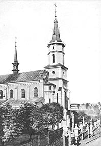 1=Костел Єзуїтів у Тернополі на поштівці початку ХХ століття. Збудований у 1898—1901 роках за проектом Діонісія Кшичковського (1861—1943).